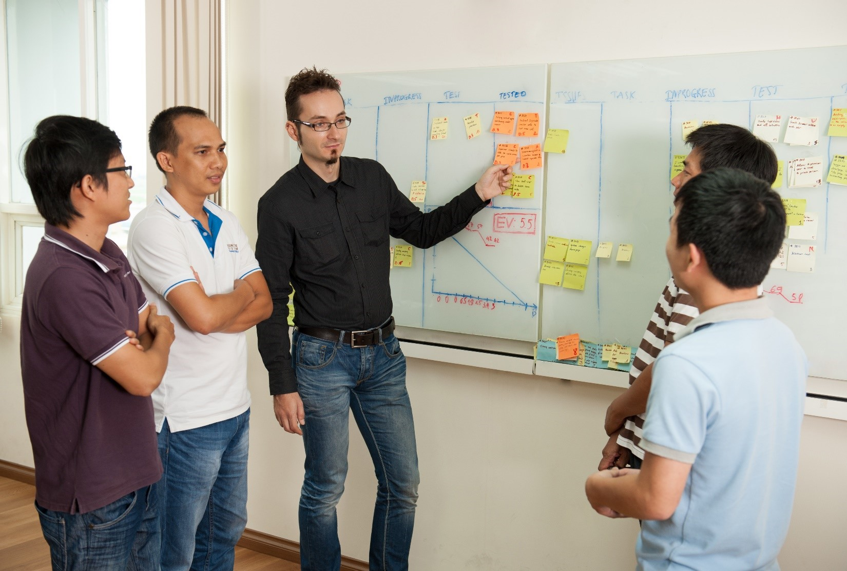 Một nhóm Scrum họp hàng ngày giúp mọi người kiểm soát khối lượng công việc và tiến độ.